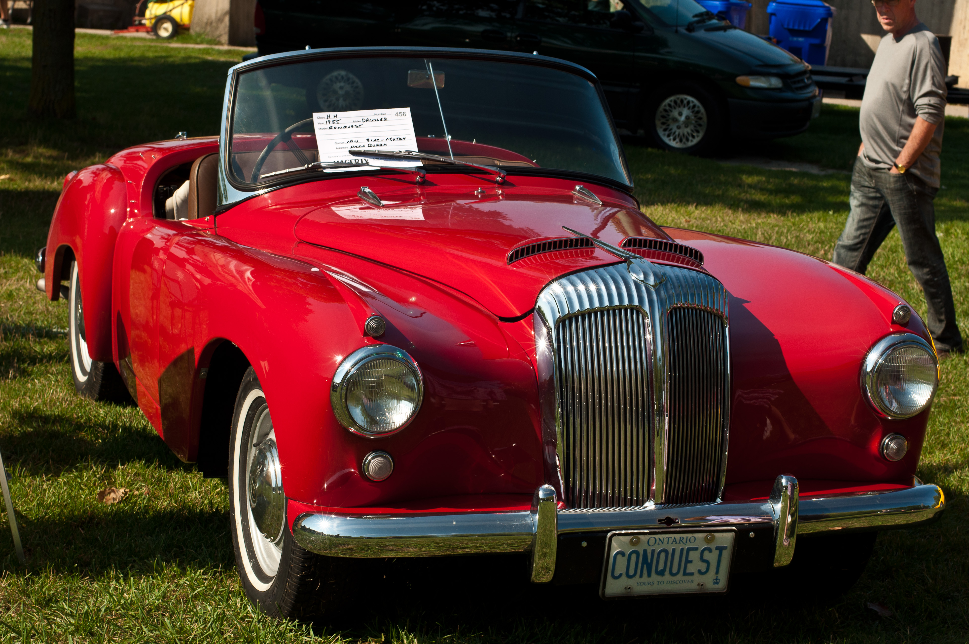 Daimler Conquest Roadster 1955